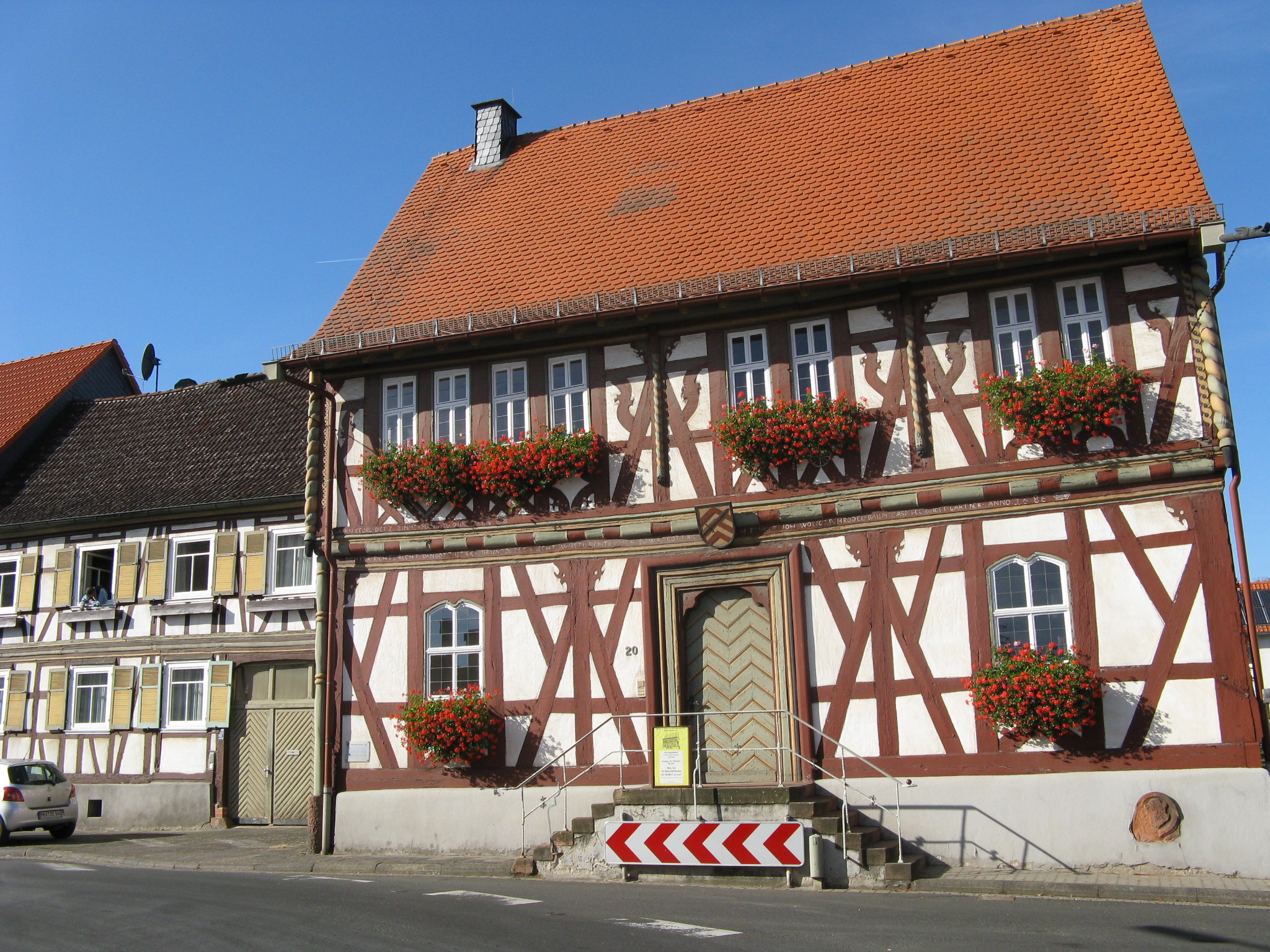 Marköbel, Town Hall Marköbel, Wetterau/Germany